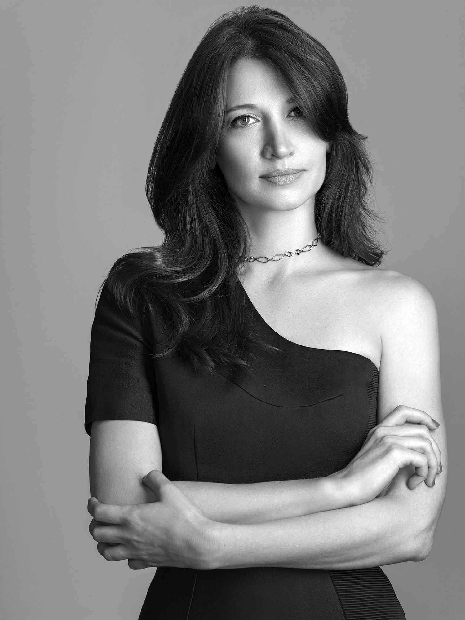 Ольга Прокопова, ювелирный дизайнер